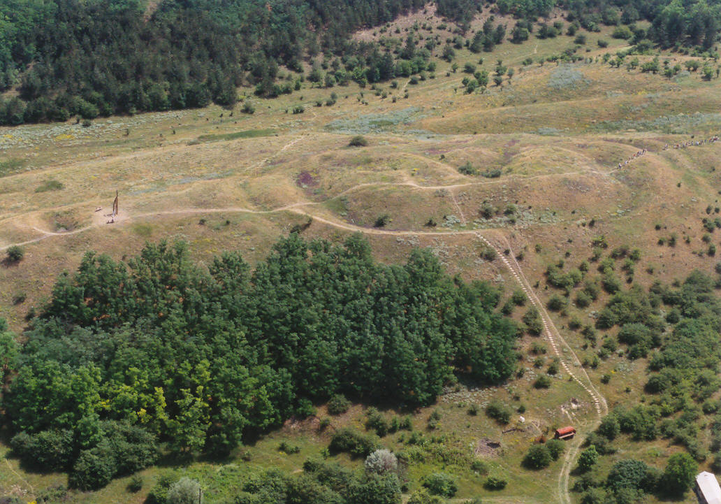 Aerial archaeology - Szentandráspart - Galgahévíz - Hungary - Europe